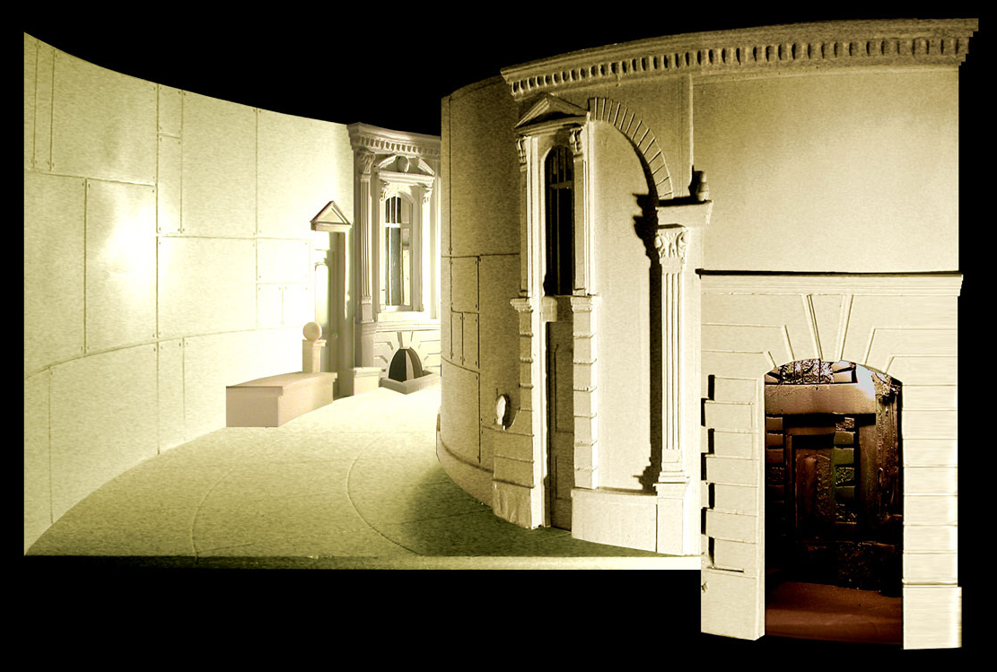 דגם ההצגה קרנפים, תיאטרון ניקיטסקי וורוט, מוסקבה, רוסיה